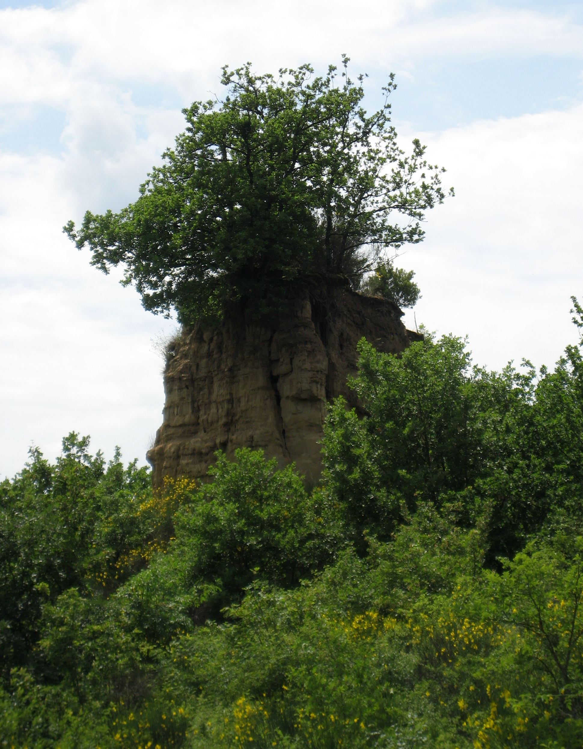 "Le Smotte"